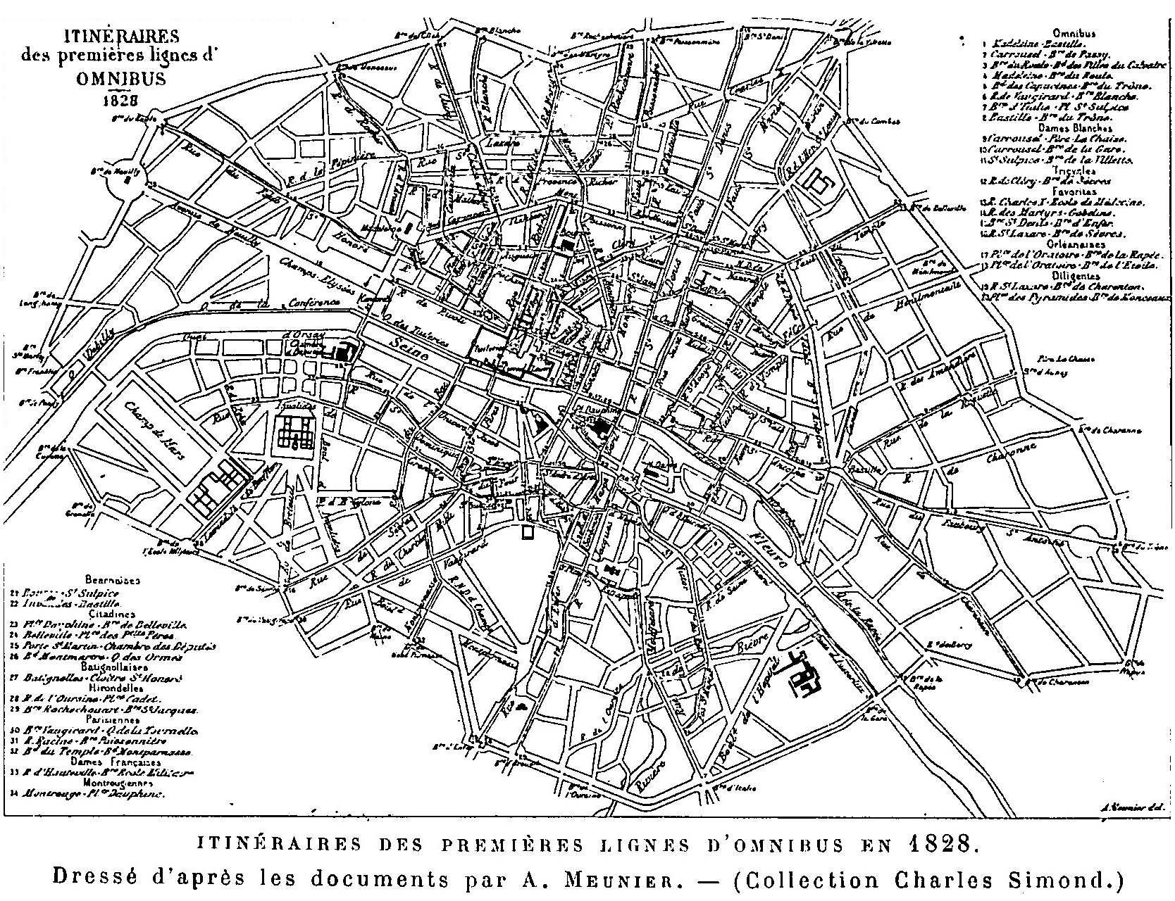 Titre : La vie parisienne à travers le XIXe siècle : Paris de 1800 à 1900 d'après les estampes et les mémoires du temps. T. 1 / publié sous la direction de Charles Simond... Éditeur : E. Plon, Nourrit et Cie (Paris) Date d'édition : 1900-1901 Contributeur : Van Cleemputte, Paul Adolphe (1837-1916). Directeur de publication Sujet : Paris (France) -- Politique et gouvernement -- 19e siècle Type : monographie imprimée Langue : Français Format : 3 vol. (IV-676, 765, 646 p.) : fig., pl., portr., cartes, plans ; 28 cm Droits : domaine public Identifiant : ark:/12148/bpt6k220535b Source : Bibliothèque nationale de France Relation : Notice d'ensemble : Relation : Provenance : bnf.fr Date de mise en ligne : 15/10/2007